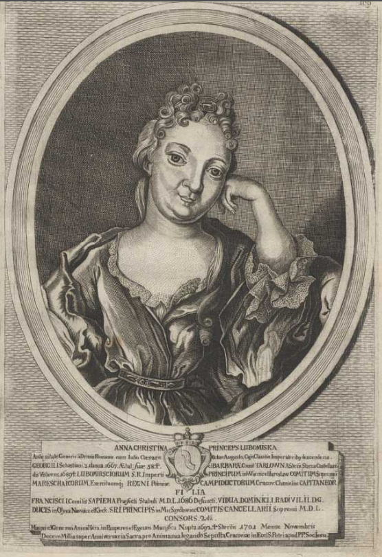 Anna Krystyna Lubomirska (1701)